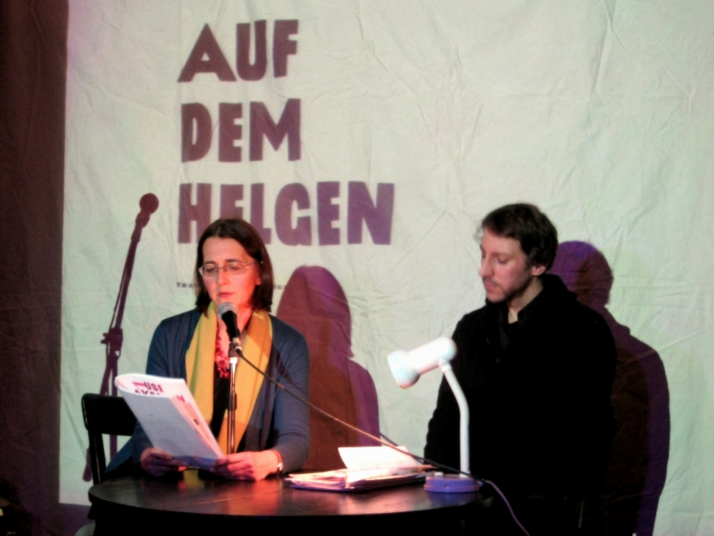 „Lesung der Straße“ – Benefizveranstaltung zu Gunsten des bremischen Straßenmagazins Zeitschrift der Straße im Kulturzentrum Lagerhaus in Bremen am 17. Februar 2012 (Autorin Renate Ullerich, bei der Lesung ihres Prosatextes aus dem Heft „Use Akschen“; rechts der Autor Jens Laloire).